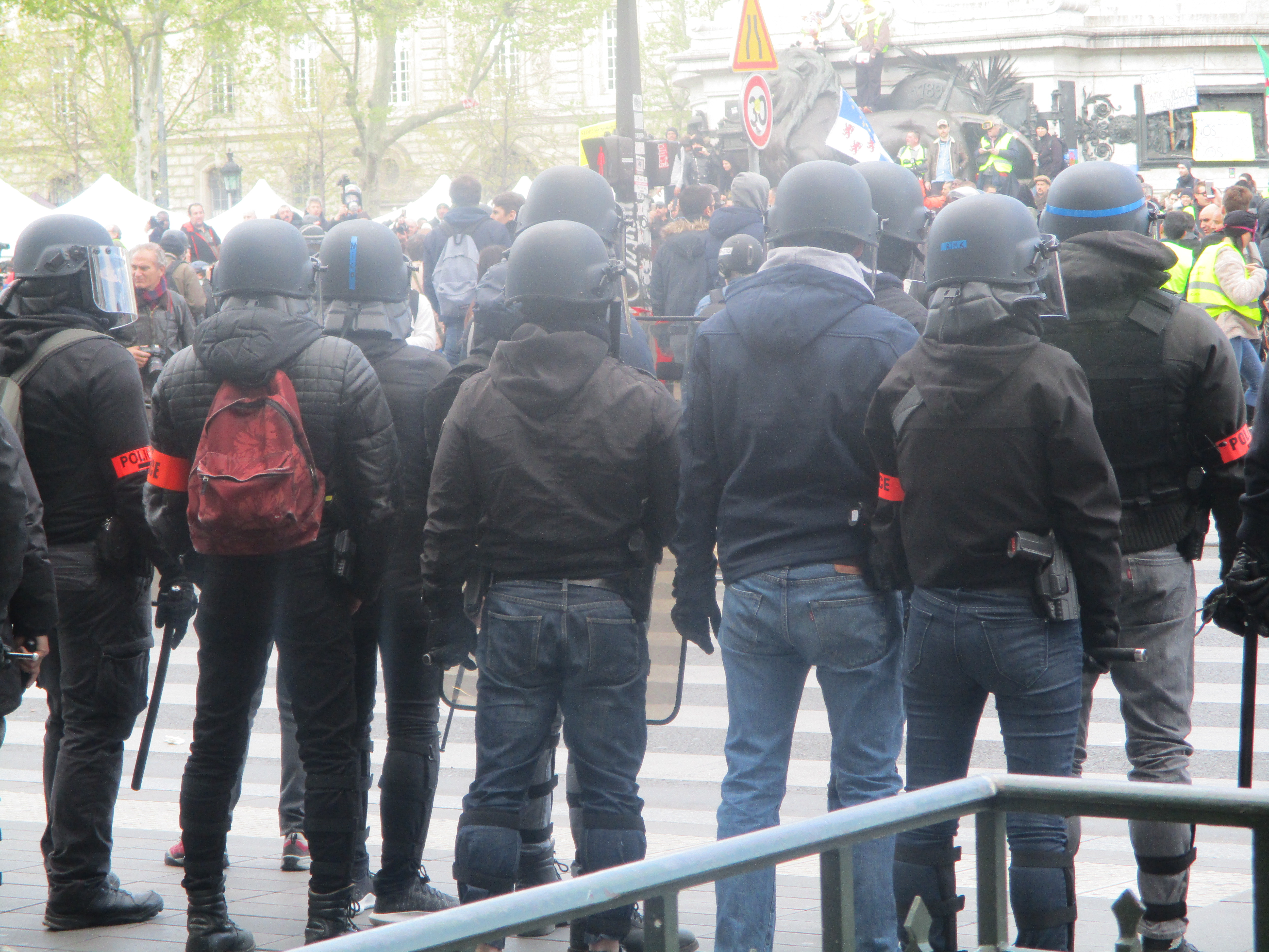 Mouvement des gilets jaunes, Paris, 13 avril 2019. Brigade anti-criminalité. Place de la République.